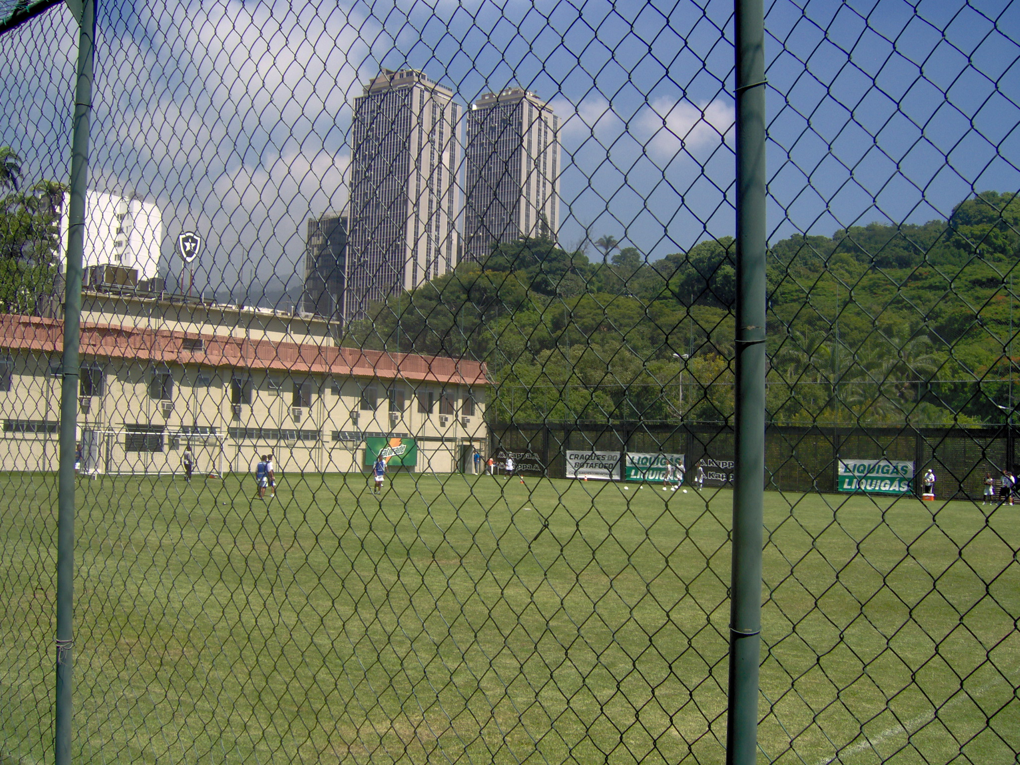 CT João Saldanha do Botafogo FR, no Rio de Janeiro, com Juan Castillo treinando.